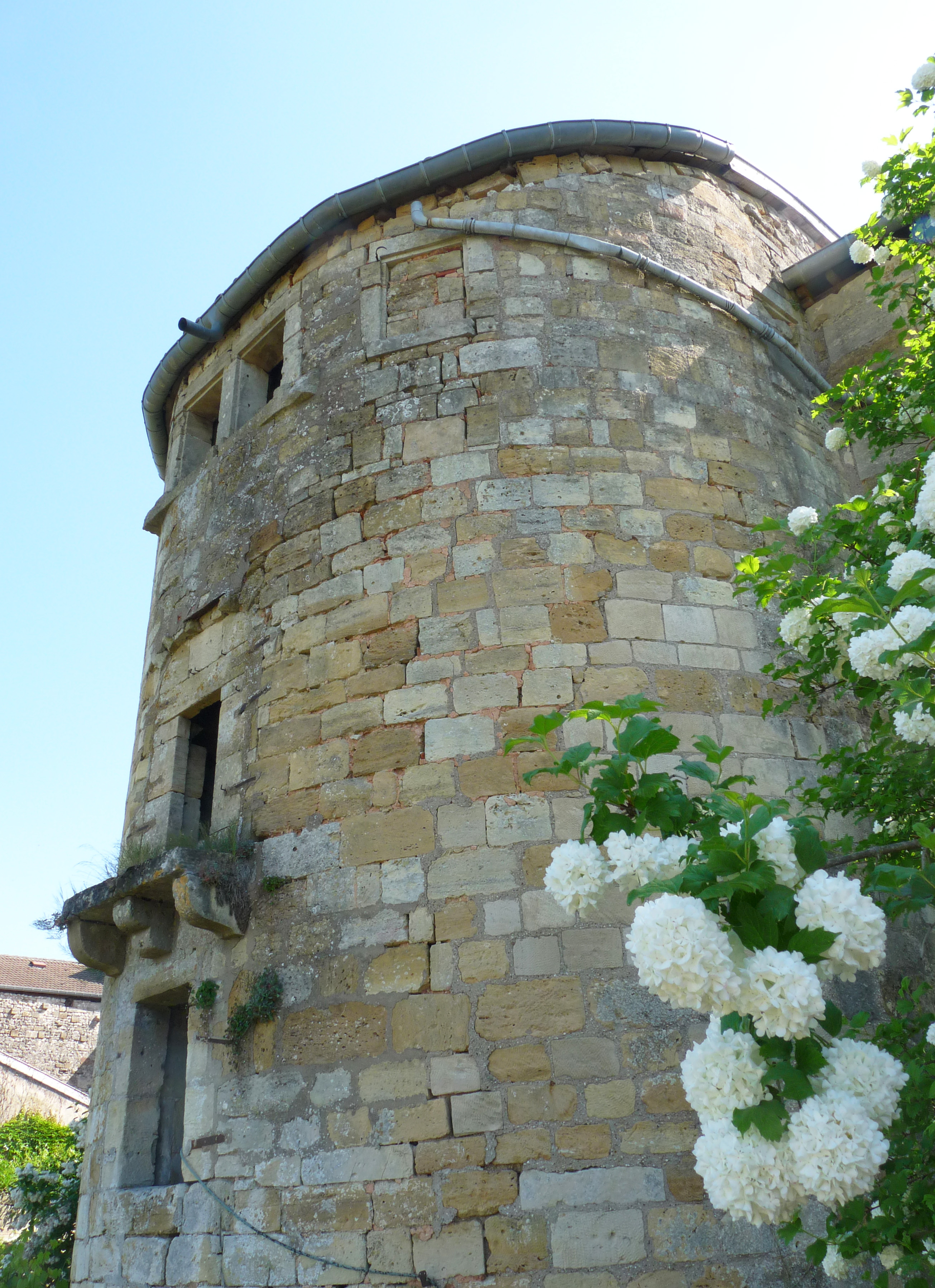 Tour Heyblot à Bar-le-Duc (Meuse), au n° 37 de la rue des Ducs-de-Bar, dans la Ville Haute. Classé par les Monuments historiques en 1930.